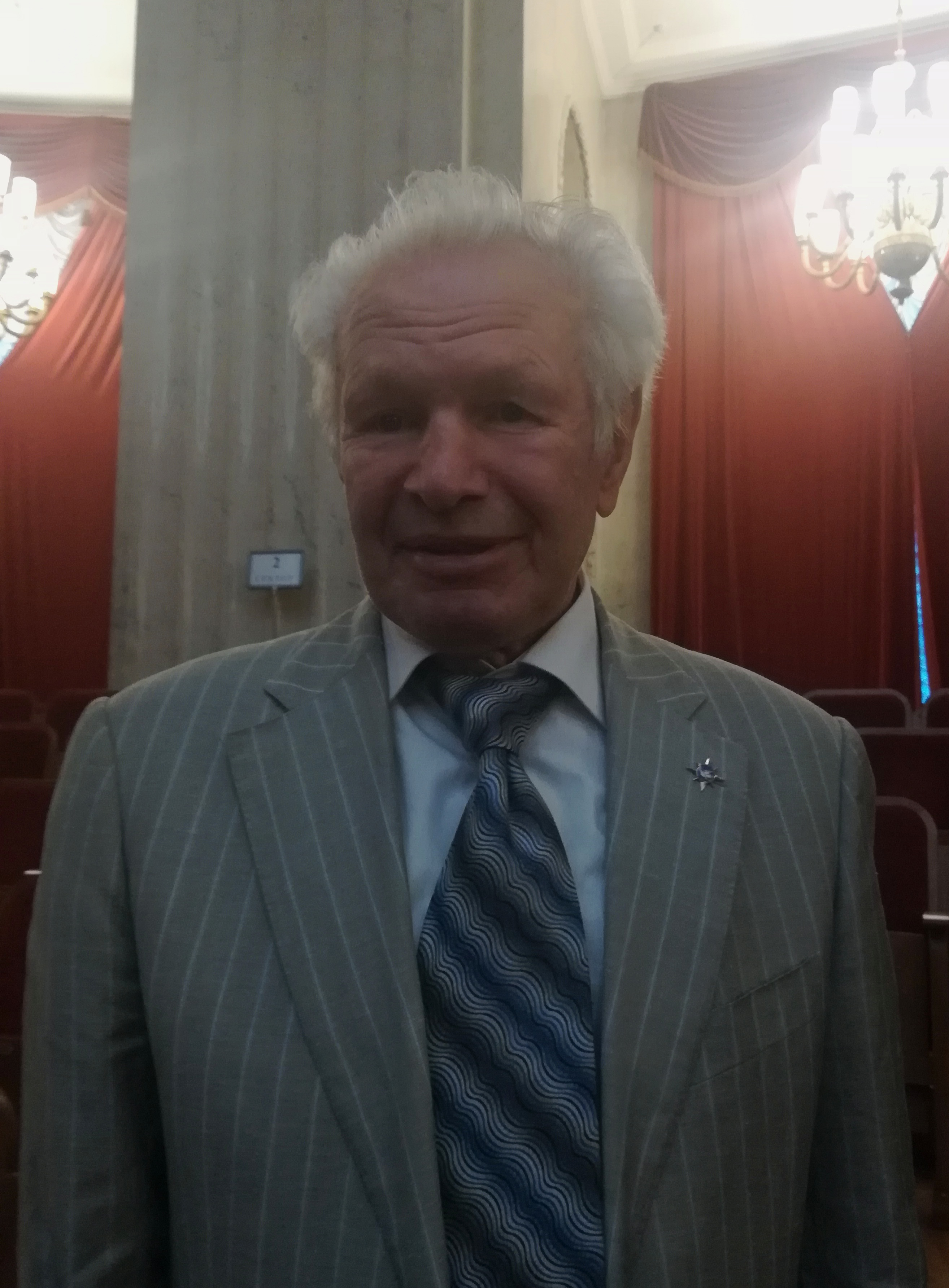 Лагутин